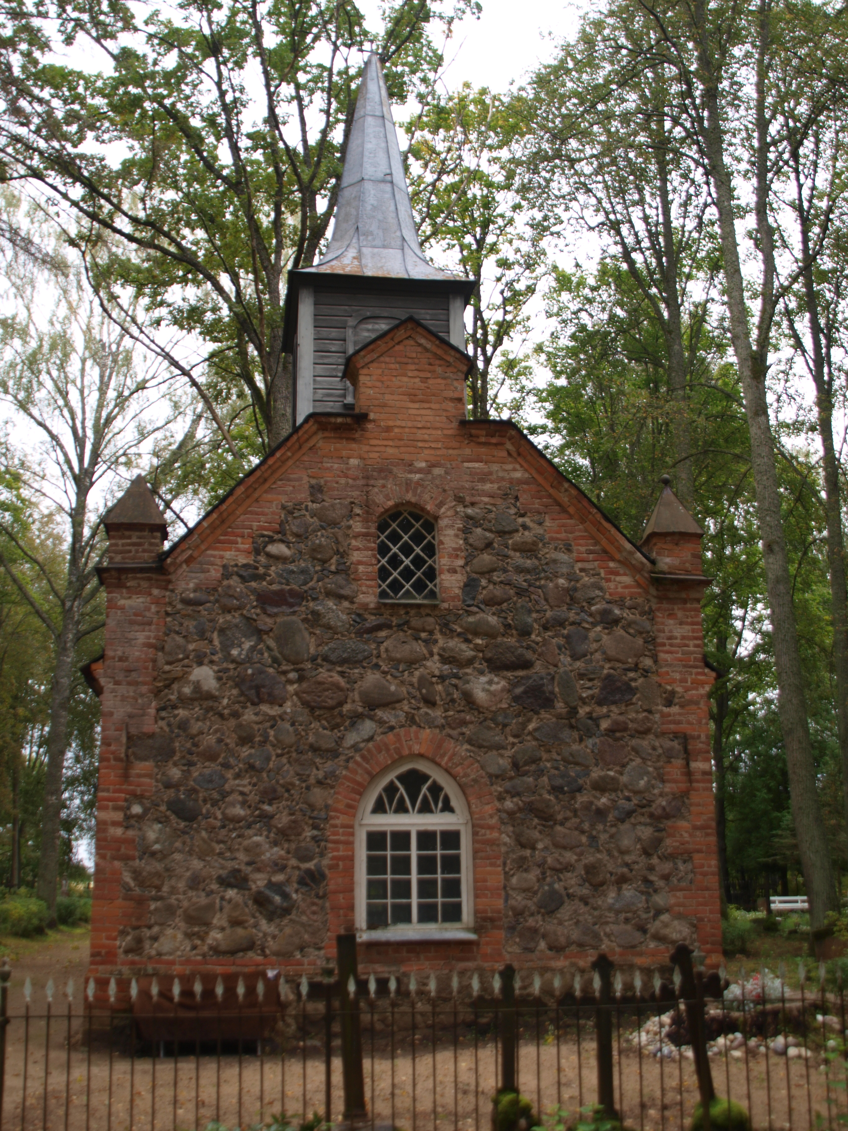 Rannu kalmistu kabel